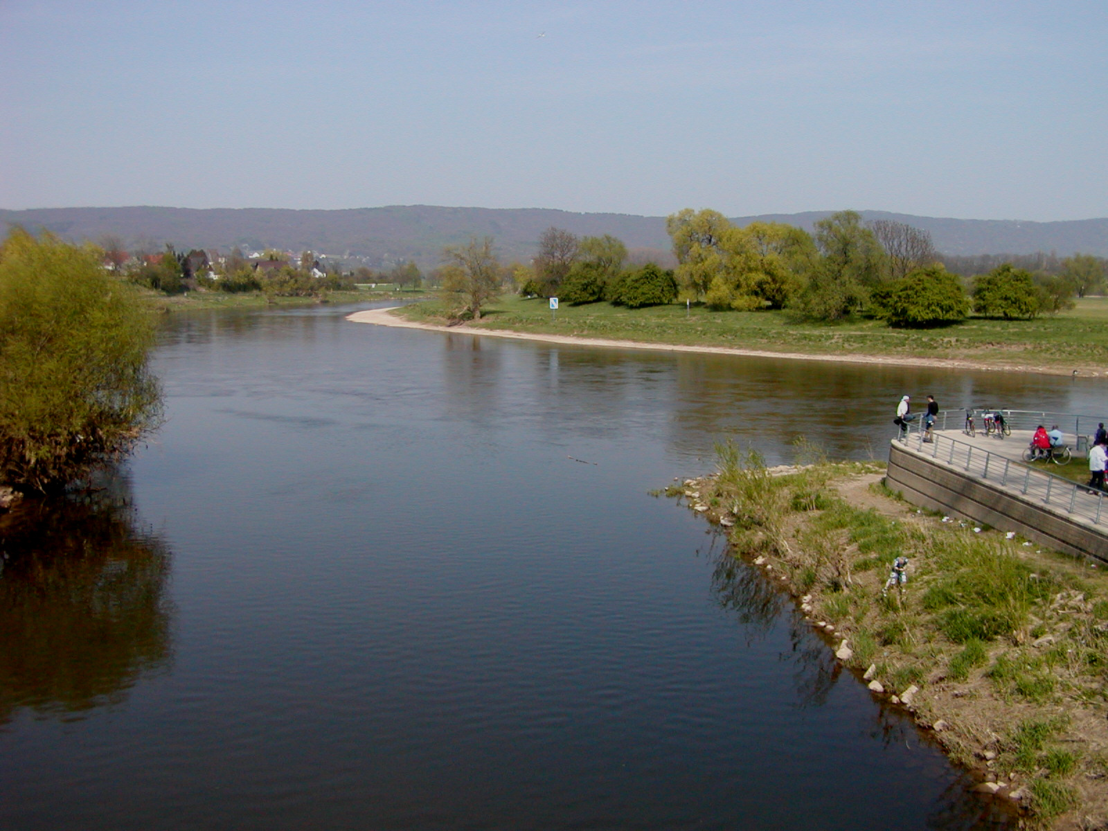 Mündung der Werre in die Weser bei Bad Oeynhausen. Im Hintergrund das Wiehengebirge.